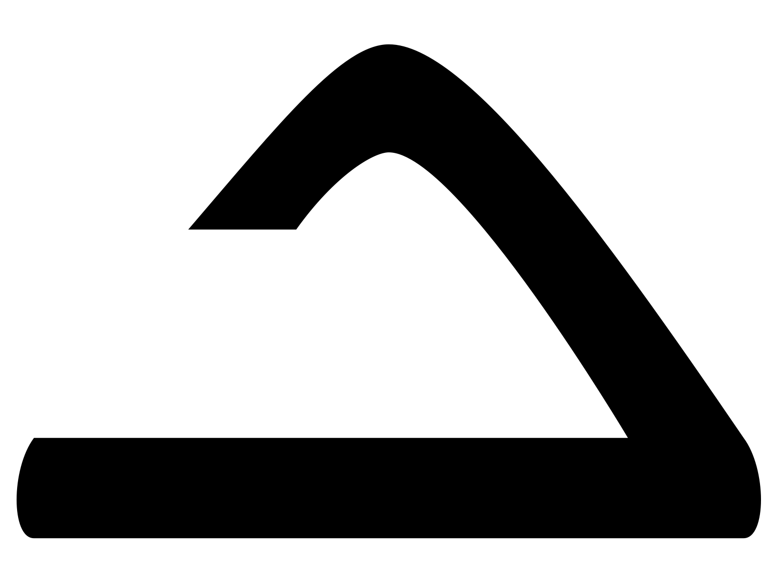 Logoen til Linjeforeningen Delta i svarthvit